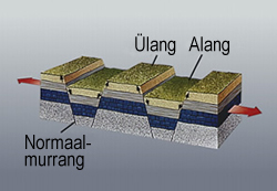 Normaalmurrangute tekkimisega moodustunud alangud ja ülangud